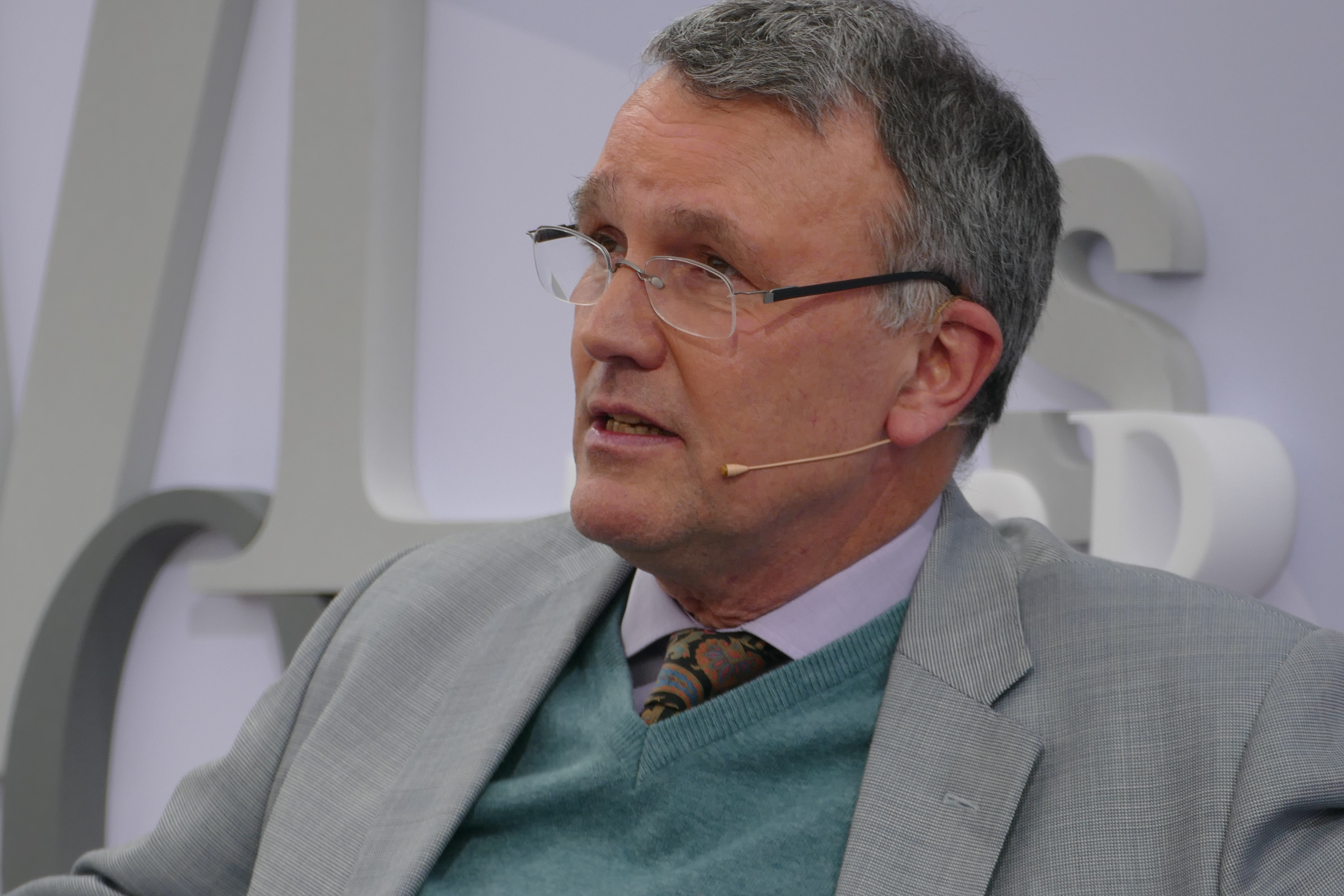 Michael Lüders stellt auf dem Blauen Sofa auf der Leipziger Buchmesse sein Buch "Die den Sturm ernten" vor.